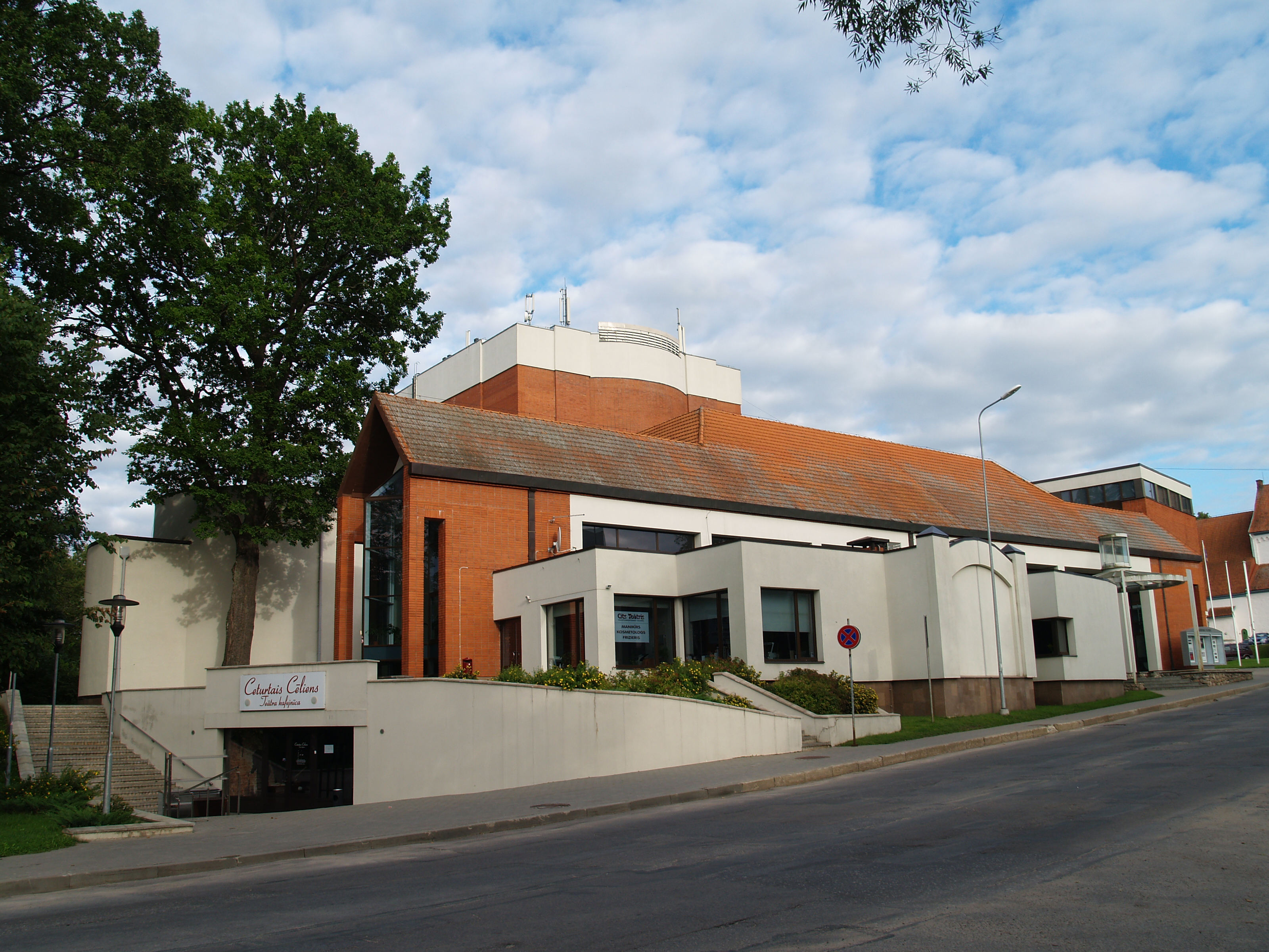 Valmiera draameteater